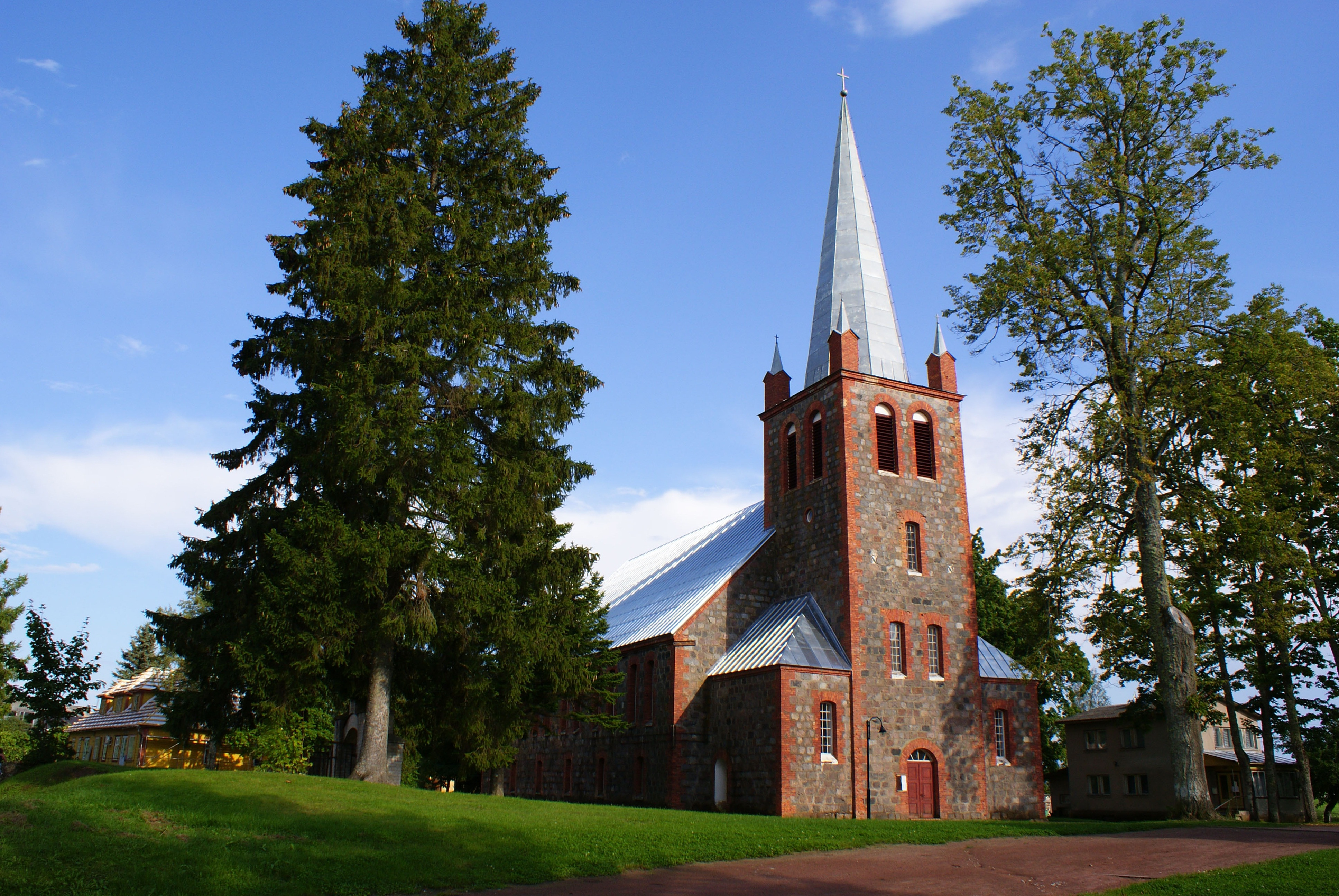 Avinurme kirik